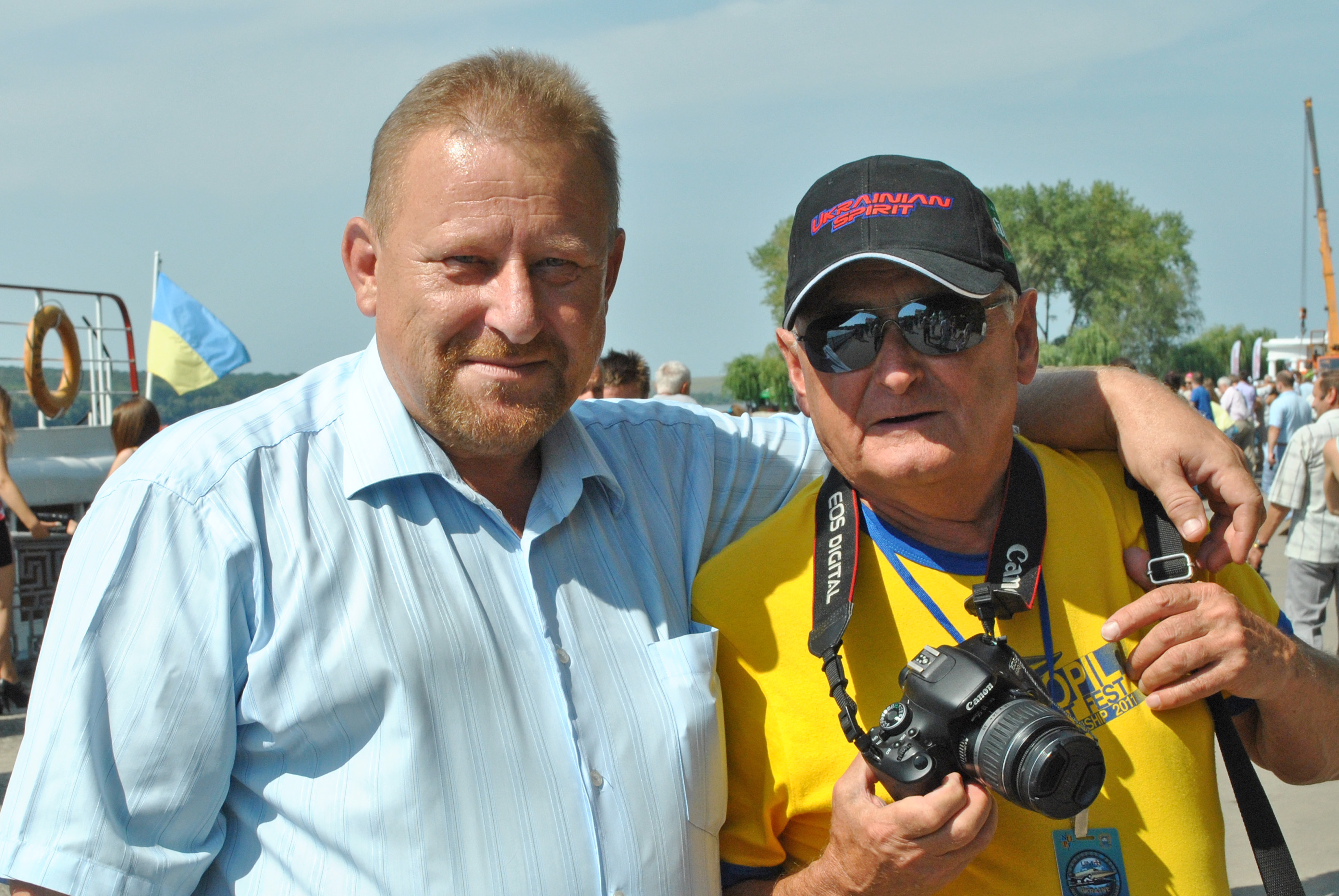 Журналісти газети «Вільне життя плюс» Богдан Дікальчук і Василь Бурма.